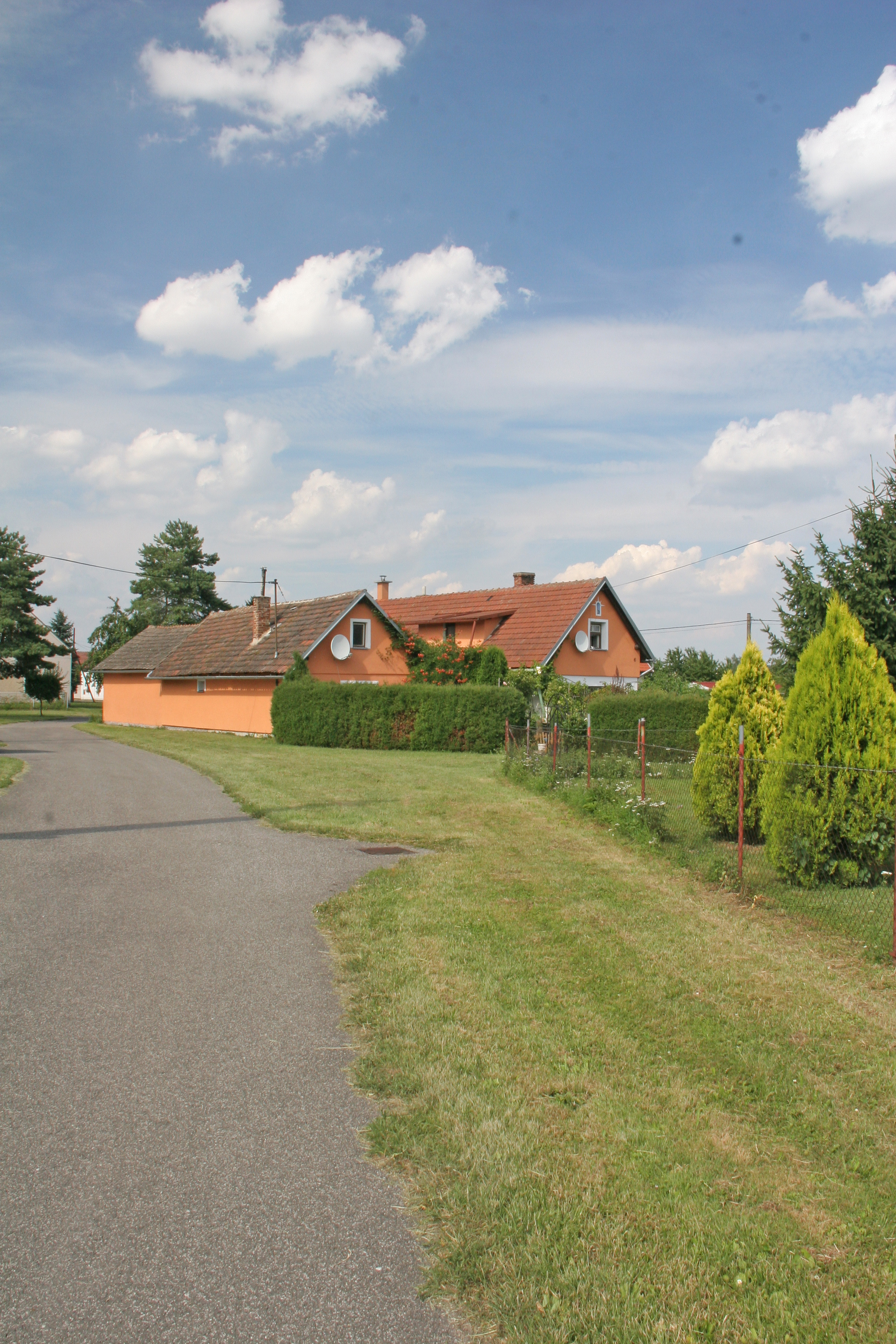 Neznášov čp. 6